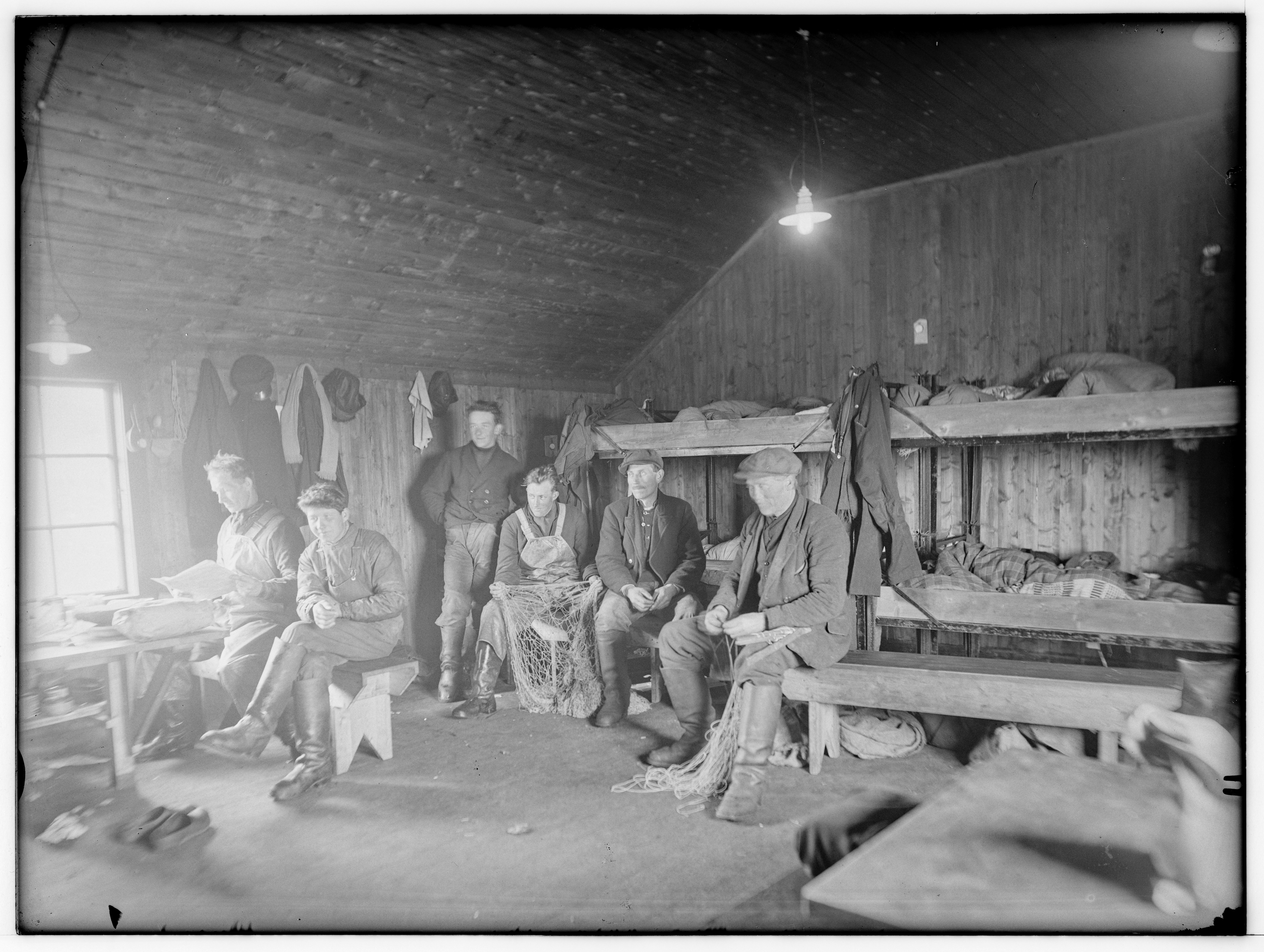 Bildet er hentet fra Arkivverket. Rorbuinteriør Kabelvåg Arkivinstitusjon : Riksarkivet Arkivnavn : Havnedirektoratet Sted : Norge, Nordland, Vågan, Emneord: Interiør Avbildet